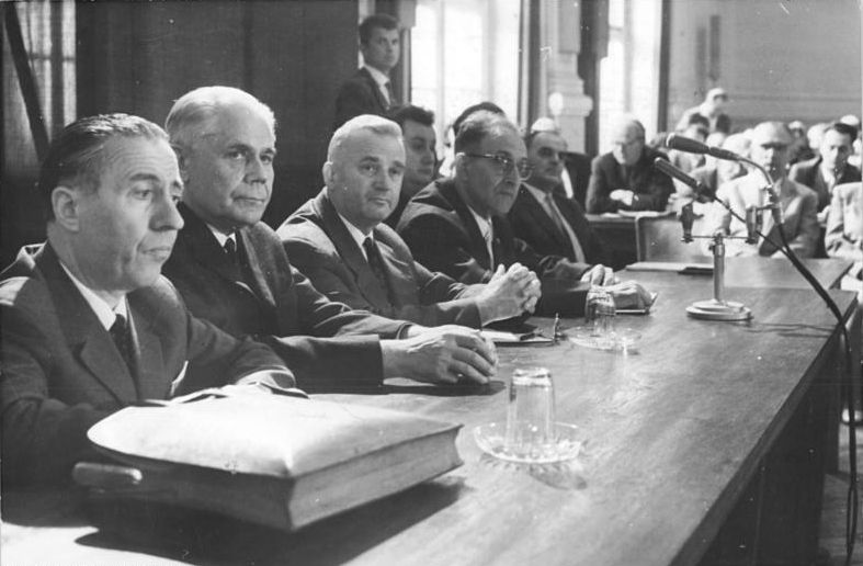 Oberstes Gericht, Globke-Prozess, Sachverständige Zentralbild Brüggmann Stöhr-8.7.1963 Globke-Prozess eröffnet. Vor dem 1. Strafsenat des Obersten Gerichts der DDR begann am 8. Juli 1963 der von der internationalen Öffentlichkeit mit großer Spannung erwartete Prozess gegen den langjährigen leitenden Mitarbeiter des faschistischen Reichsinnenministeriums und derzeitigen Bonner Staatssekretär Dr. Hans Globke. UBz: Die Sachverständigen (vlnr): Prof. Horoszowsci (Polen); Prof. Dr. Krus (UdSSR); Dr. Jurgenis (UdSSR); Prof. Stefan Heymann (DDR); Pror. Kral (CSSR); Dr. Riege (DDR); Prof. Engelberg (DDR).